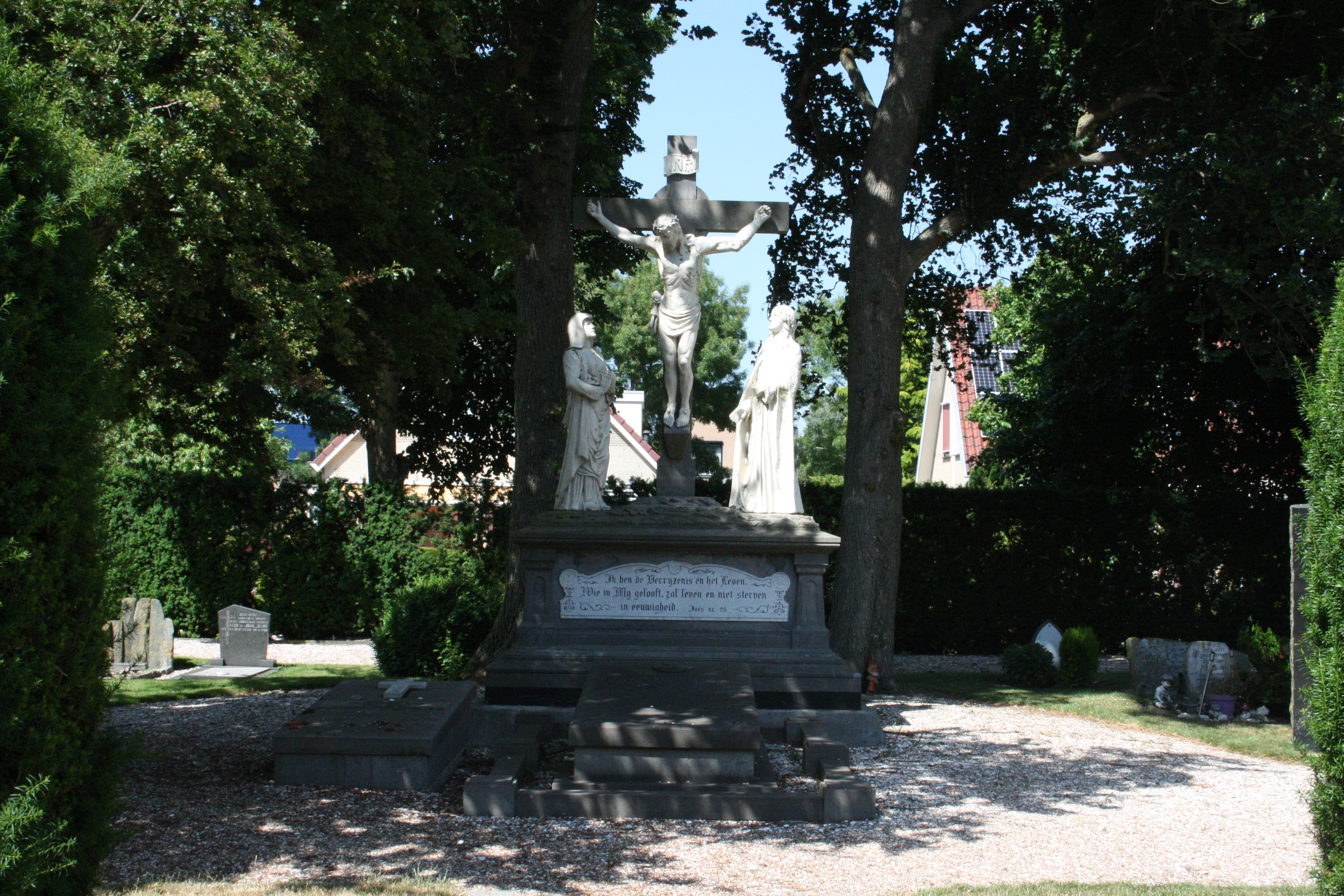 Priestergraf en monument op het RK kerkhof van Grootebroek